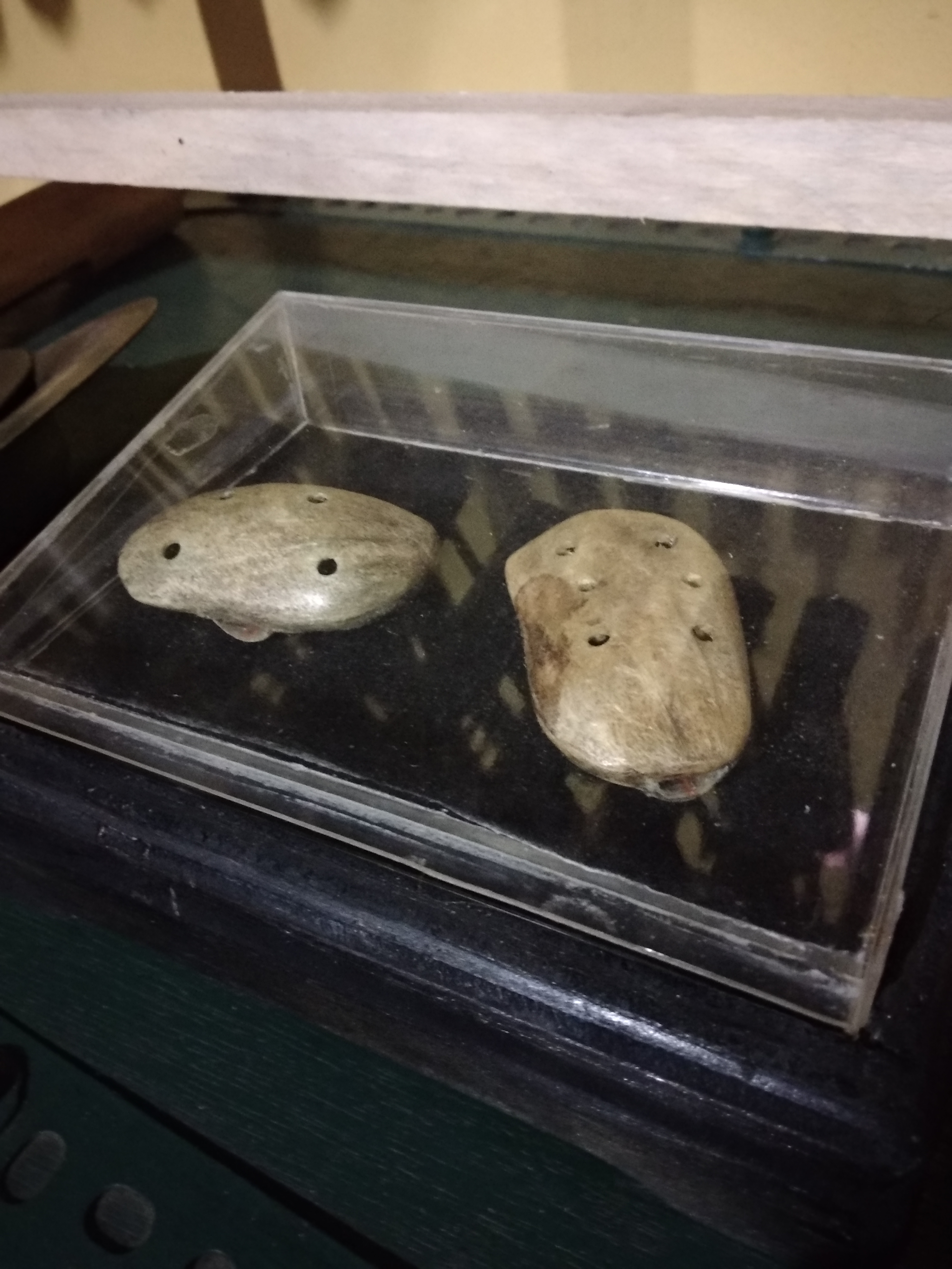 Alat Musik Okarina di Museum Musik Indonesia